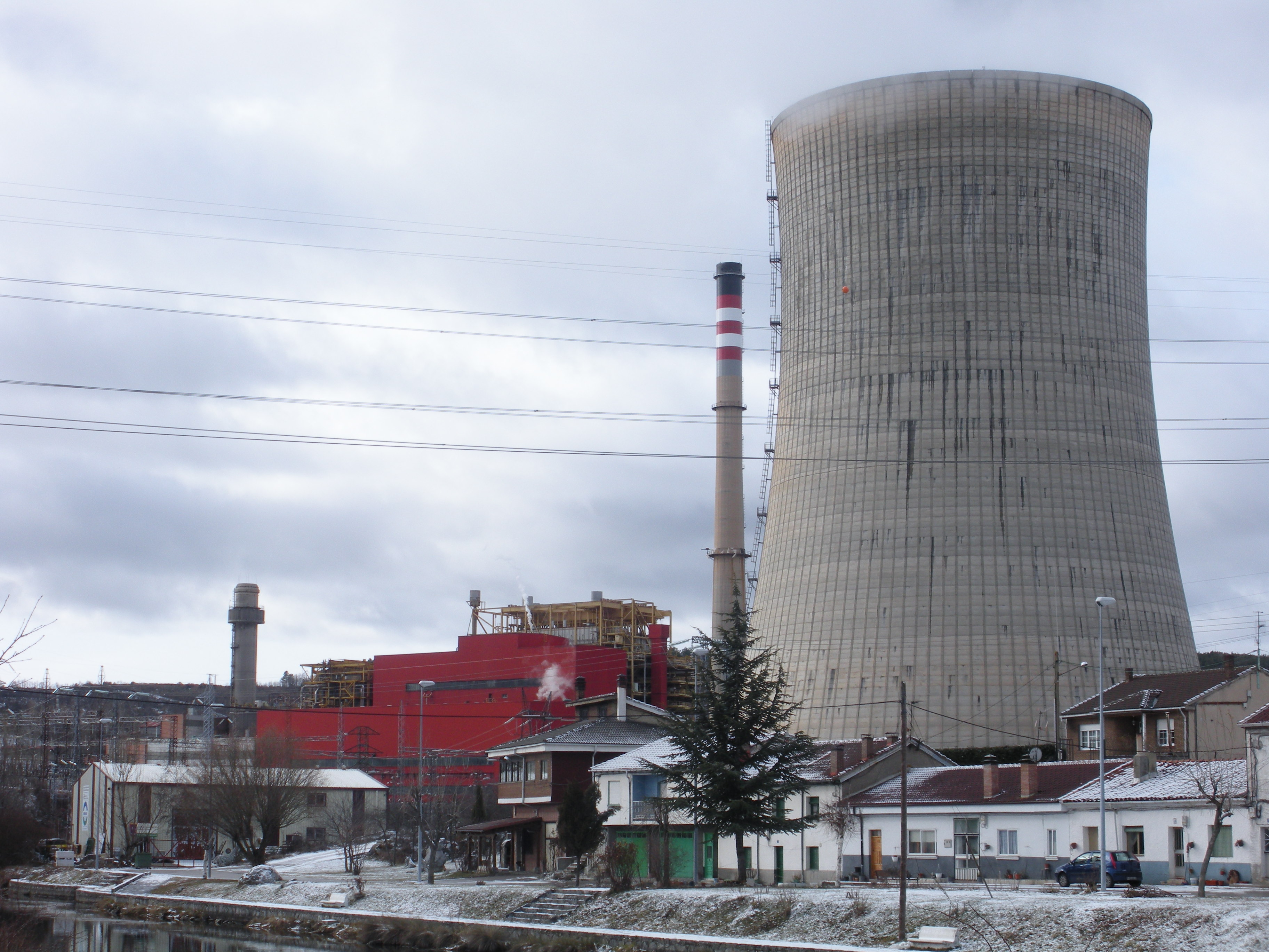 Vista de la Central Térmica de Velilla del Río Carrión (Palencia)